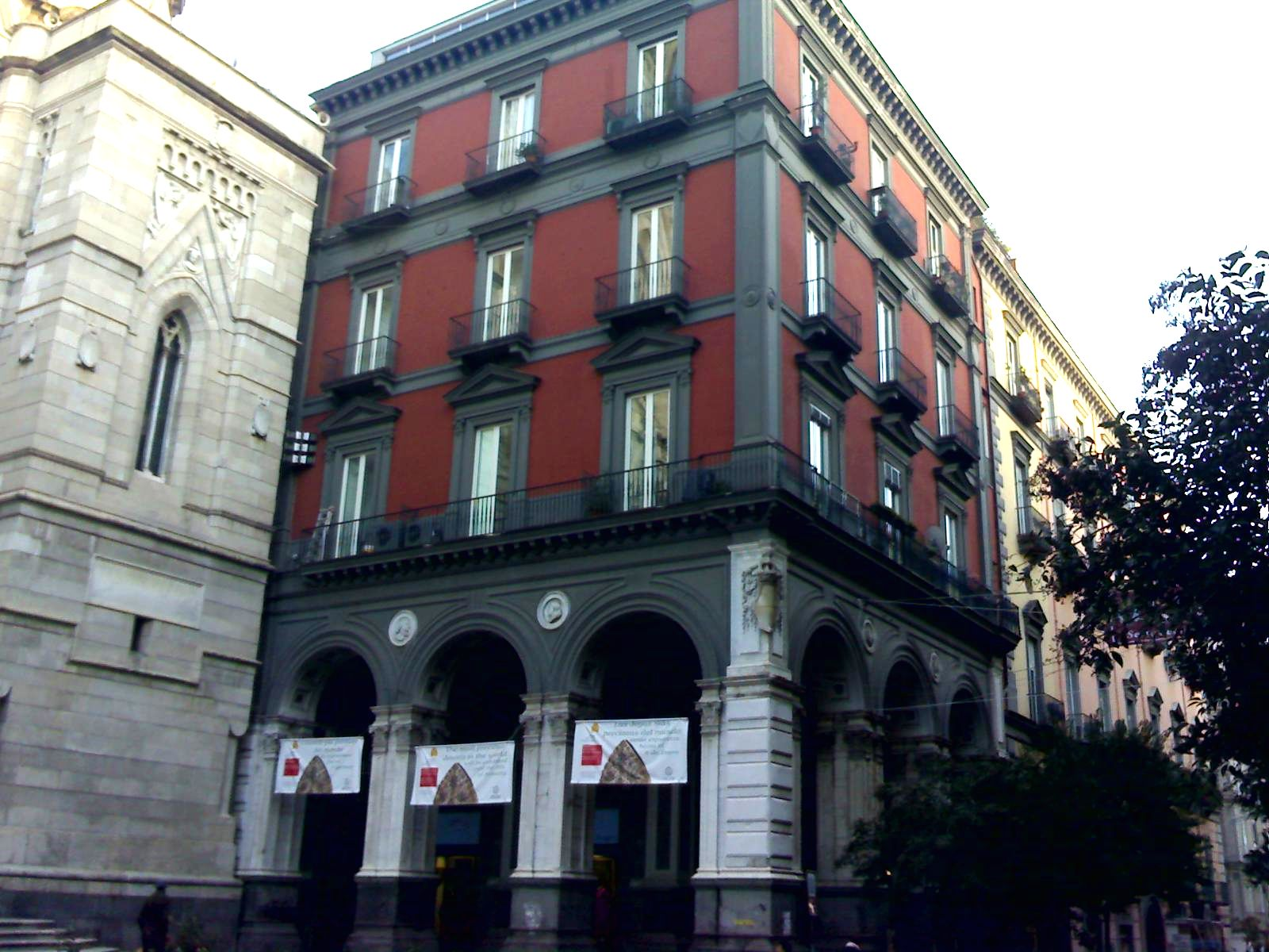 Ingresso al museo del tesoro di San Gennaro